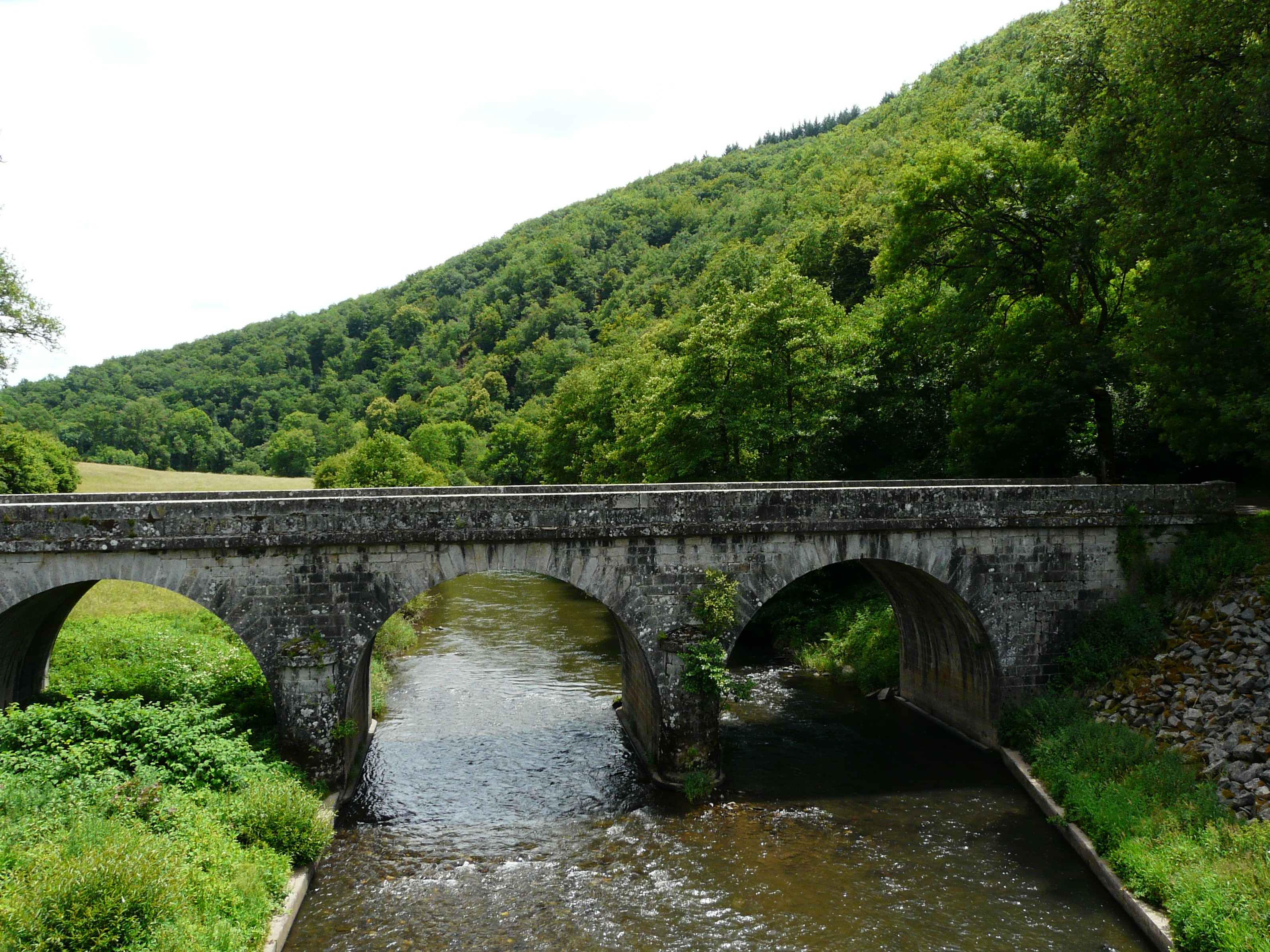 La Cère au Pas du Laurent, Sansac-de-Marmiesse, Cantal, France. Vue prise en direction de l'amont depuis le pont de la route nationale 122.